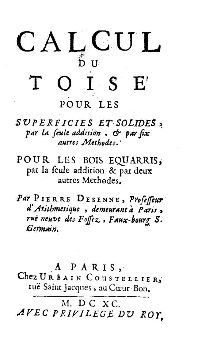 Calcul du toisé pour les superficies et solides, par la seule addition, et par six autres methodes. Pour les bois equarris, par la seule addition & par deux autres methodes. Par Pierre Desenne, professeur d'arithmetique, .... - A Paris : chez Urbain Coustellier, 1690. - 27, [1], [104], 44, [4] p., [5] c. di tav. ; 12º .